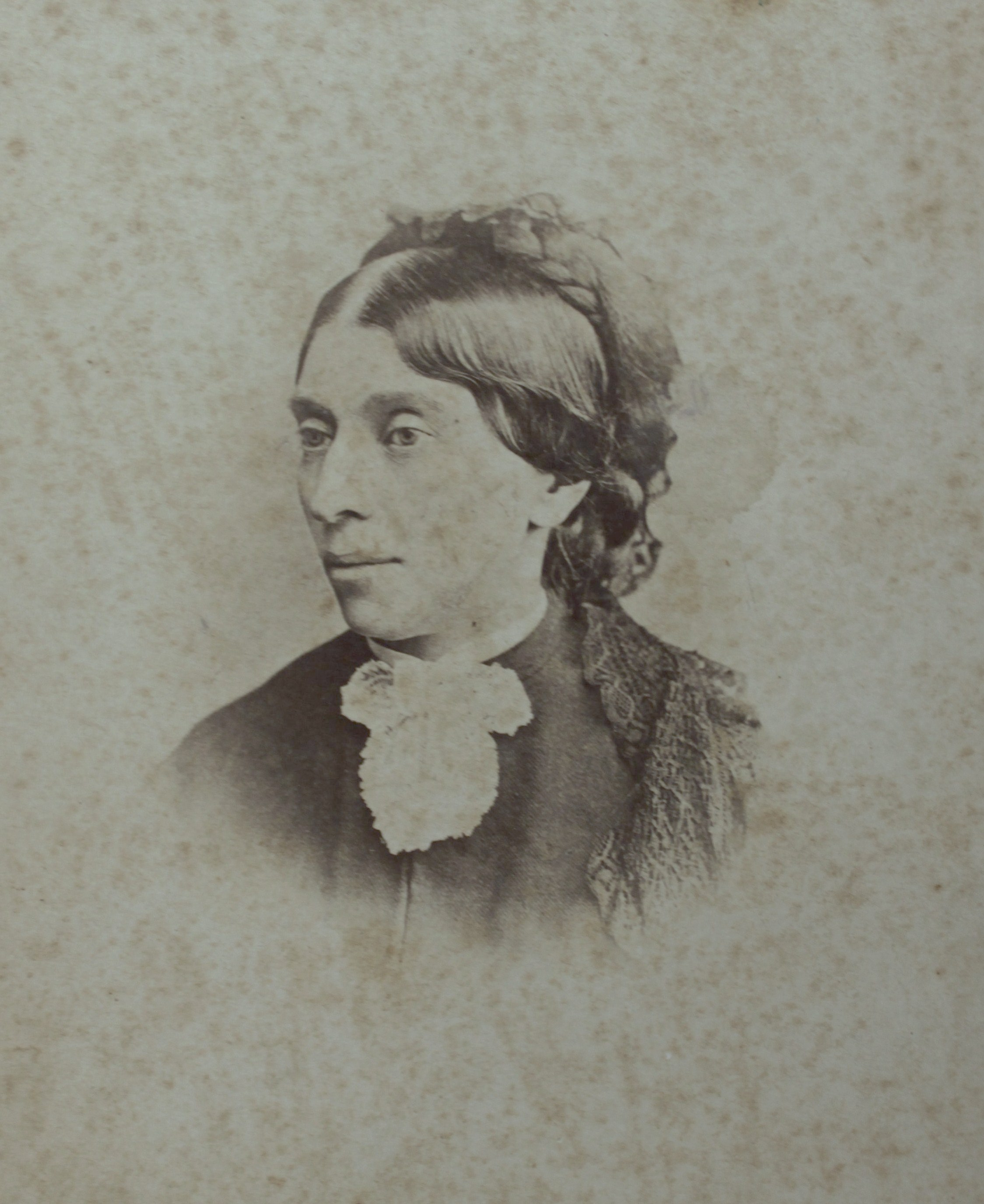 Ольга Егоровна Озерова, ур. Пашкова (1825—1873), жена А. П. Озерова (1817—1900)